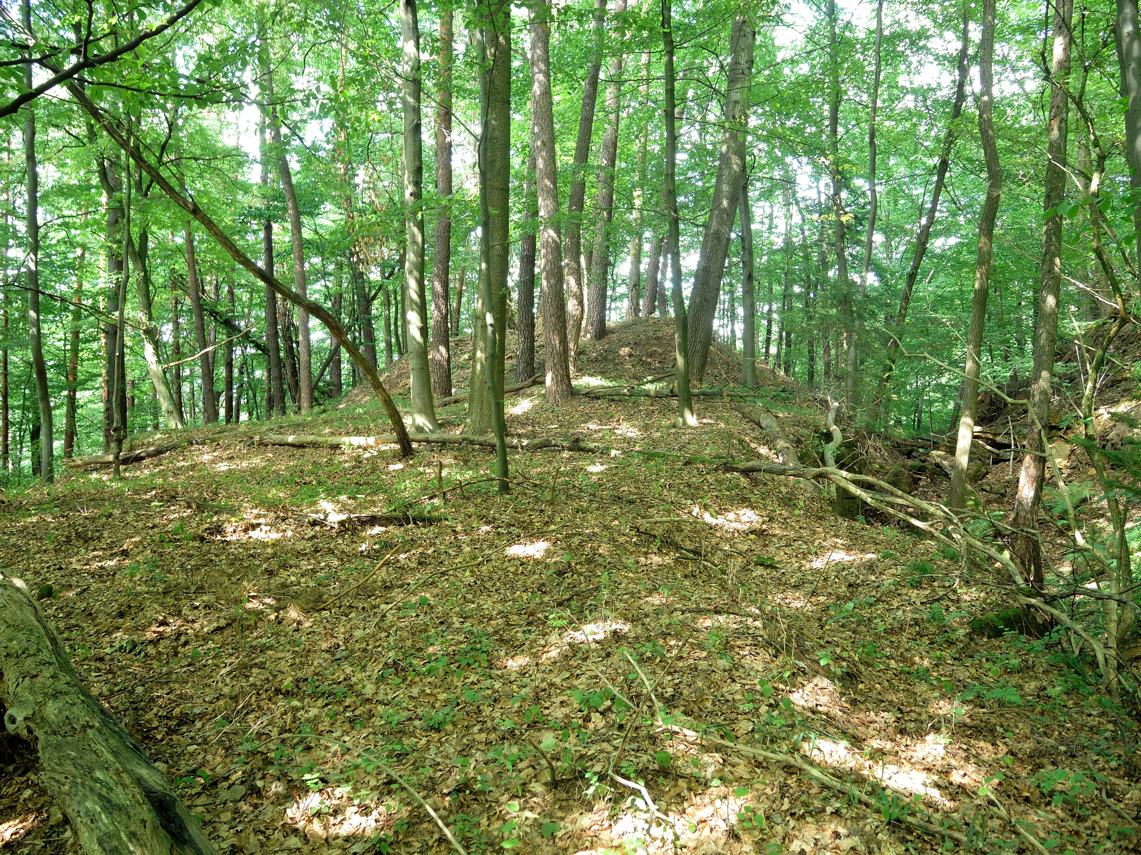 Burgstall Hacburg - Ansicht des Kernburghügels